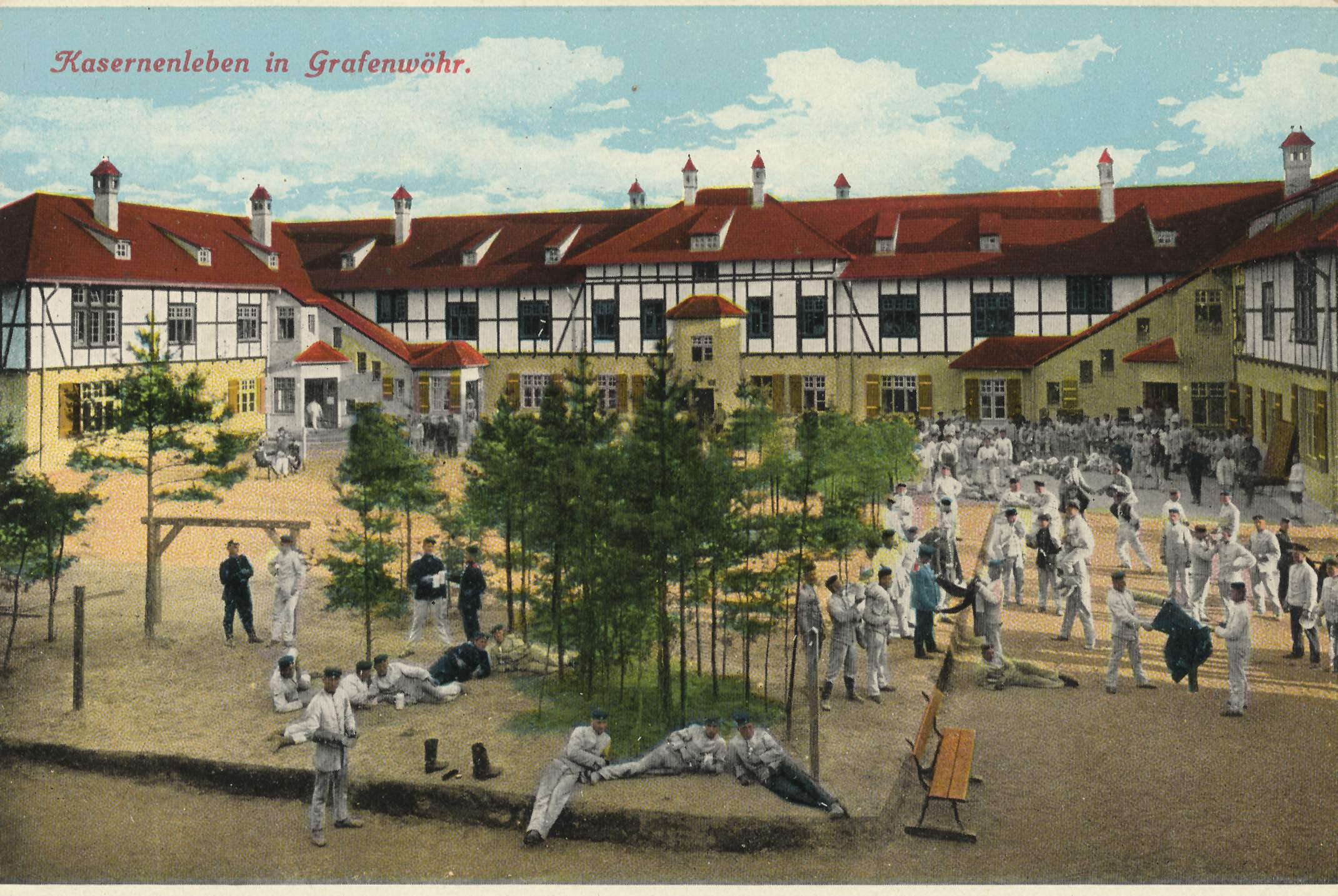 Kolorierte Bildseite der Ansichtskarte mit der fortlaufenden Nummer 9 aus dem Verlag von Hans Spahn in Grafenwöhr, mit einem Einblick in das Kasernenleben. Die wohl mehr als einhundert in der detailreich belebten Szenerie zu erkennenden Soldaten in ihren weißen Uniformen dürften überwiegend die Summe zahlreicher kunstvoll eingefügten Fotomontagen abbilden - eine schon im 19. Jahrhundert von zahlreichen Fotografen oft geübte Praxis, zugleich ein Verkaufsargument ...